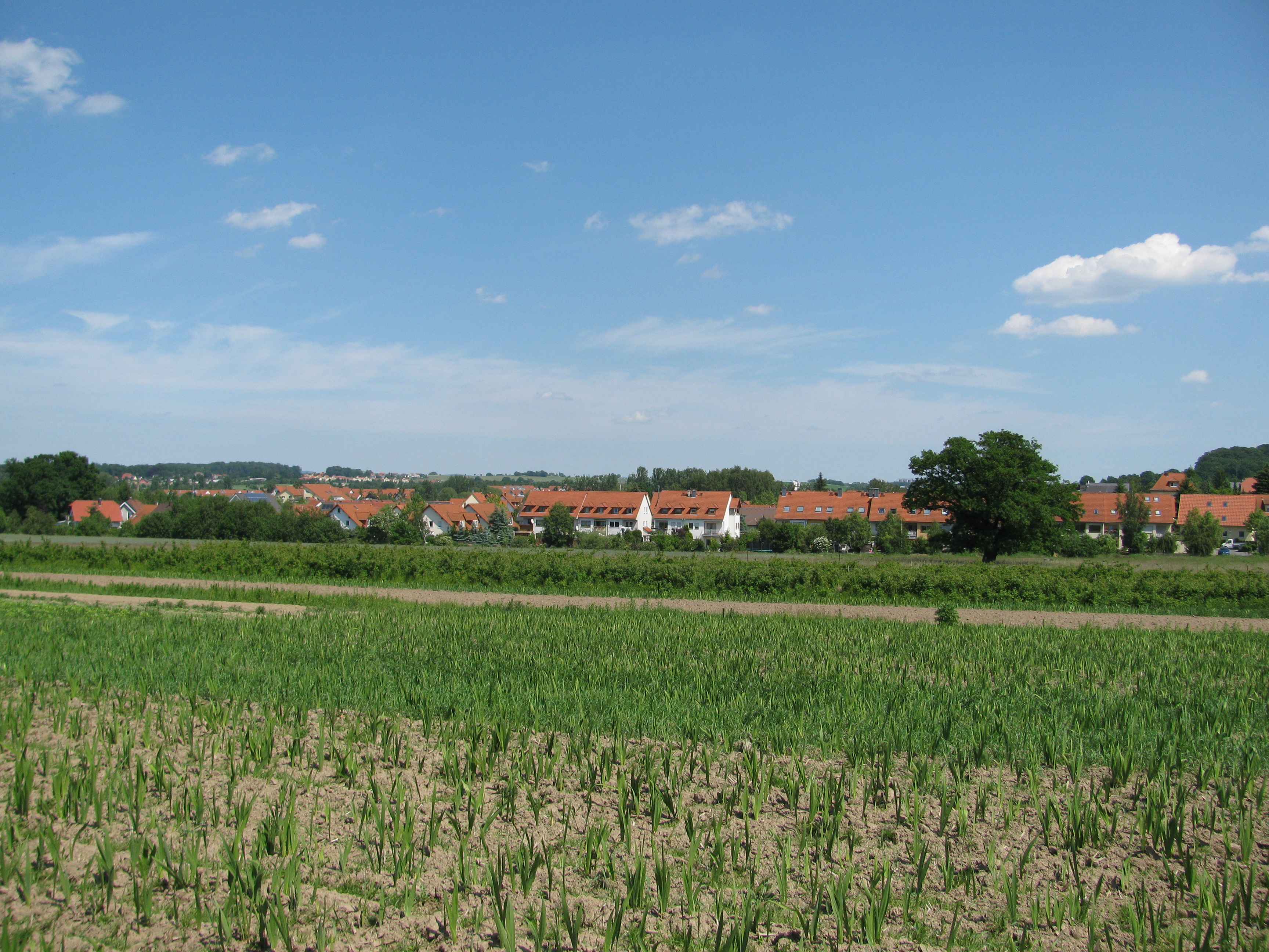 nach 1990 auf freiem Feld entstandene Siedlung in Weißig, Ortsteil von Dresden